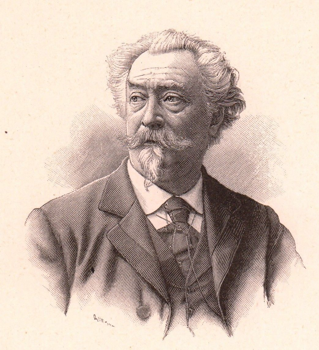 Portrait du sculpteur français Henri Allouard (1844-1929)